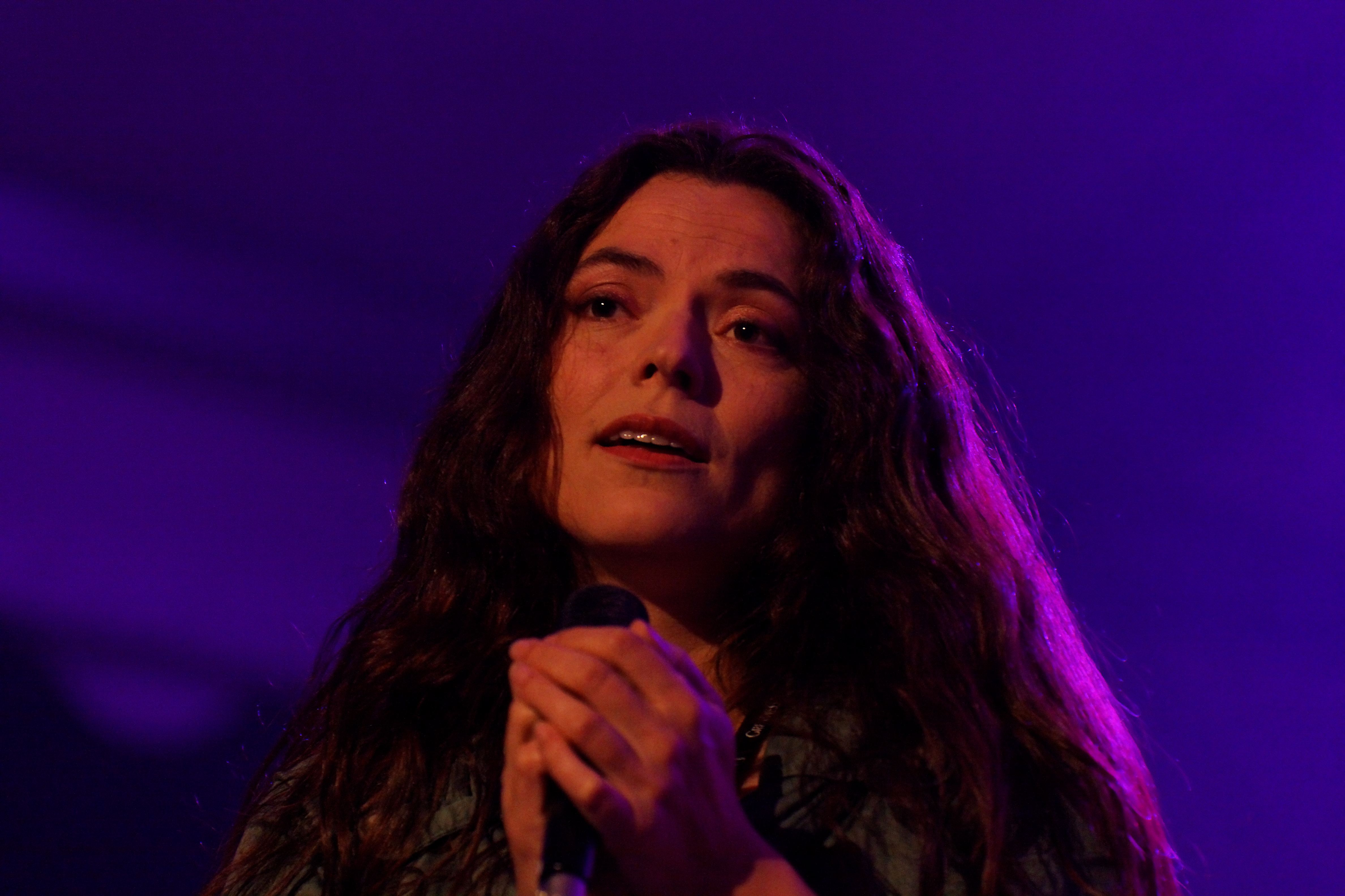 Gilles le Bigot Group en concert le 19 juillet lors du festival de Cornouaille 2011.